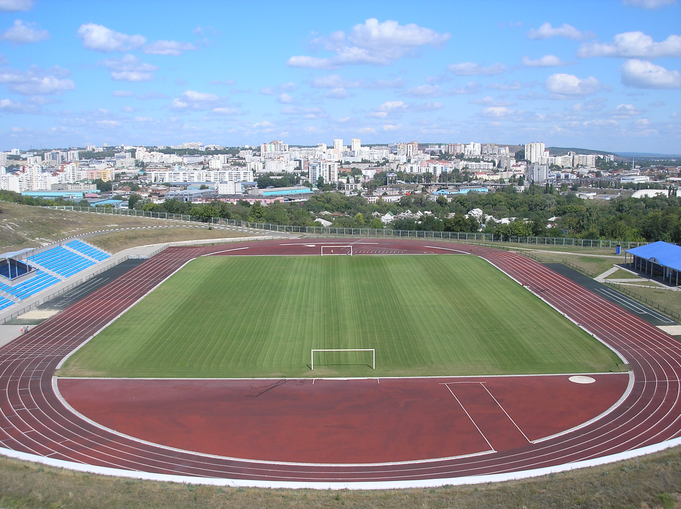 Вид на центр с футбольного стадиона БГТУ им. В.Г. Шухова